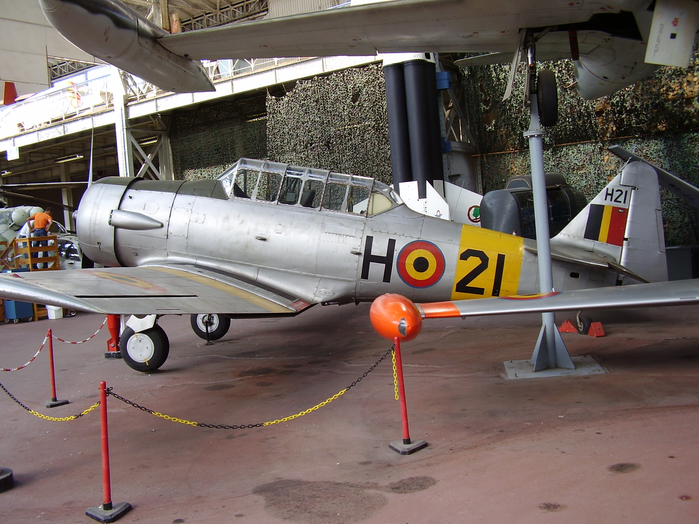 Royal Military Museum Brussels, Musée Royal de l'Armée, Koninklijk Museum van het Leger en de Krijgsgeschiedenis